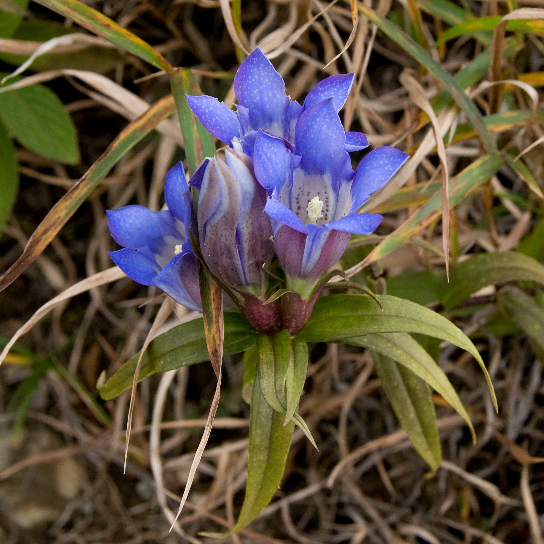 リンドウ (学名:Gentiana scabra var. buergeri)